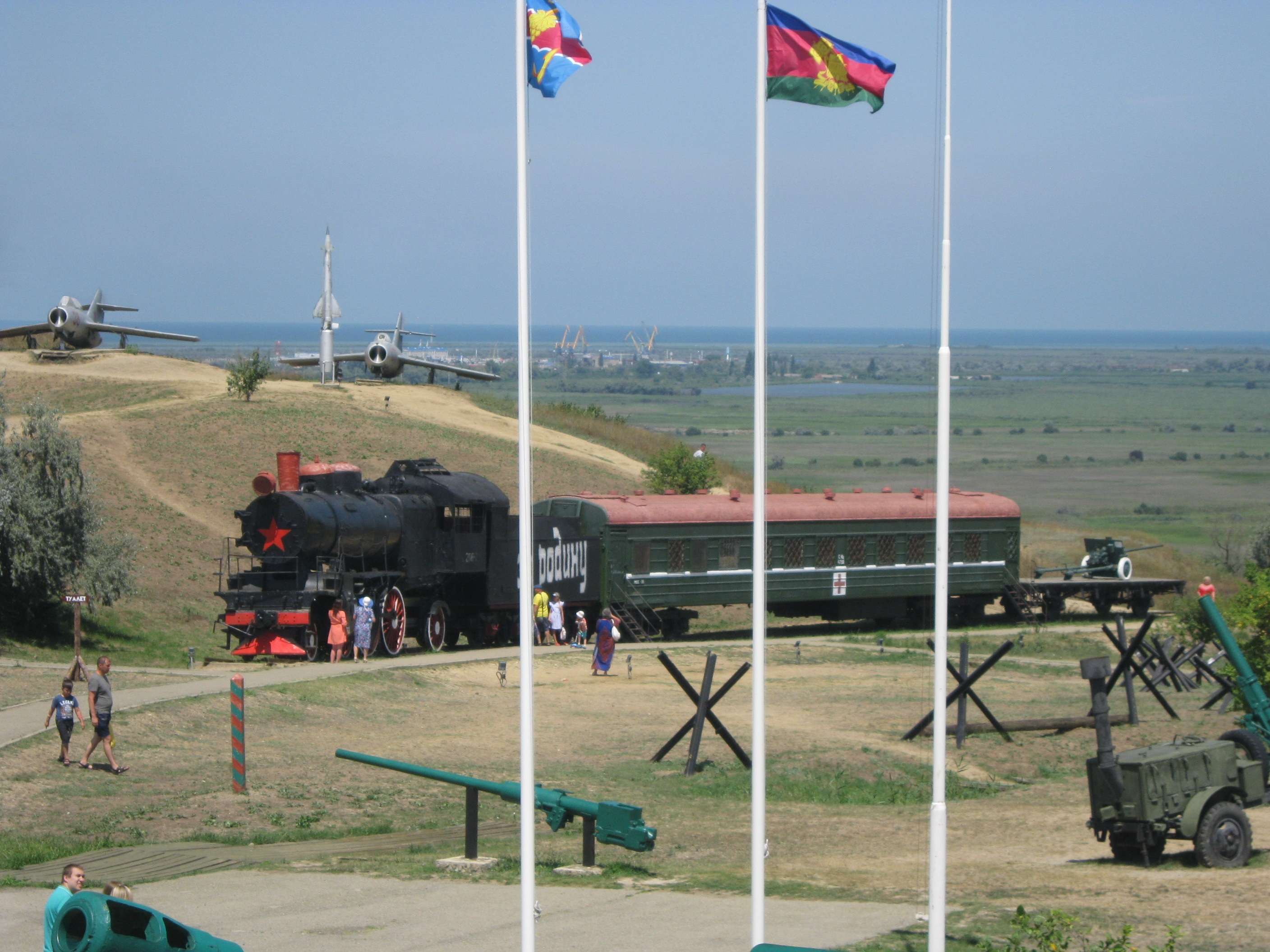 Военная горка (Темрюк)